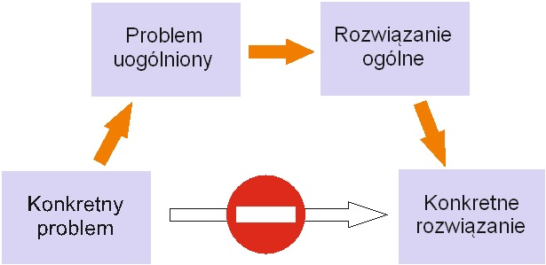 Uogólniona ścieżka dojścia do rozwiązania w TRIZ